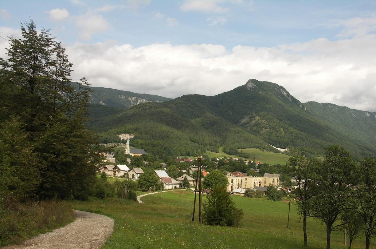 Cigánka Mountain (935 m AMSL), Muránska planina National Park, Slovakia